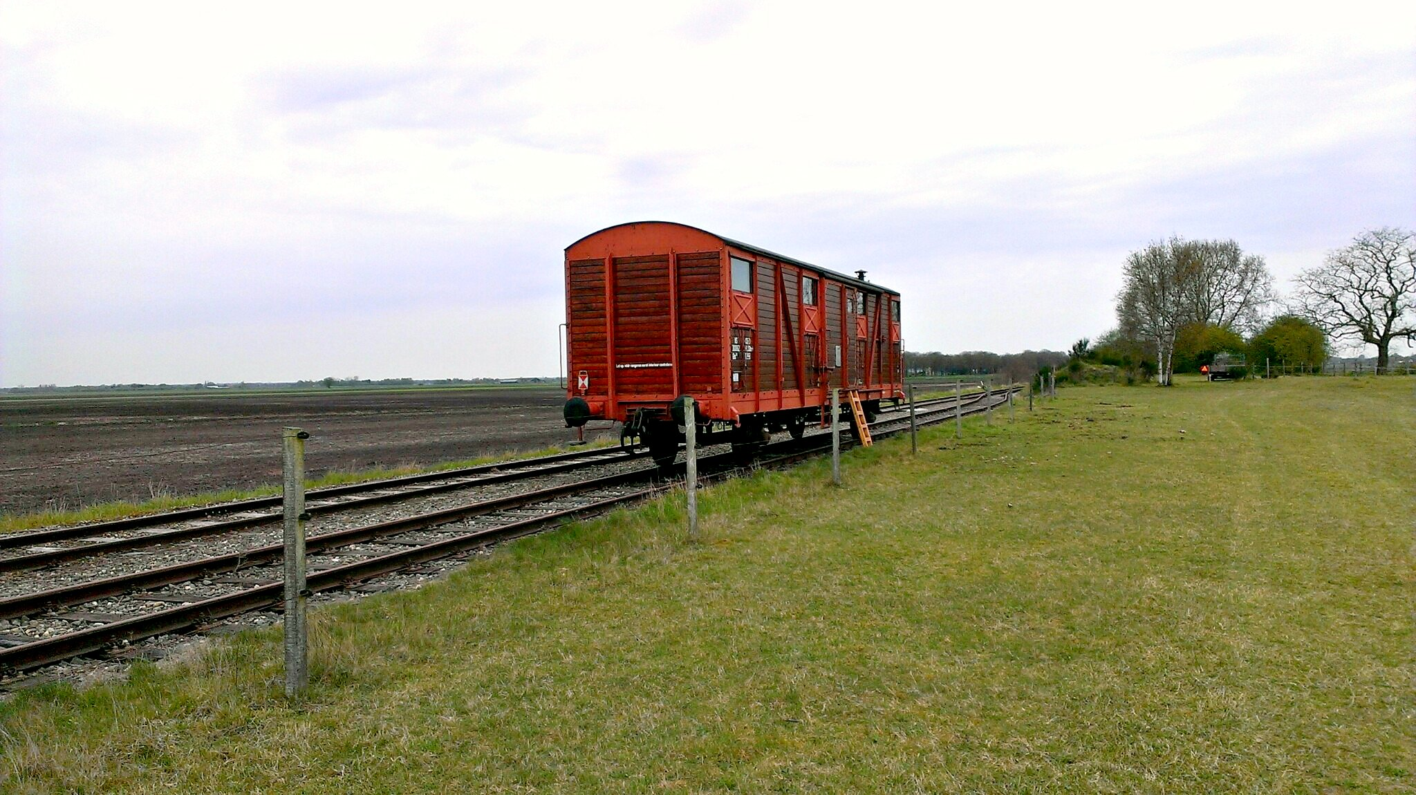 De STARwagon die deel uitmaakt van het kunstproject Semslinie Kunstlijn op een omloopspoor bij voormalig Station Stadskanaal Pekelderweg